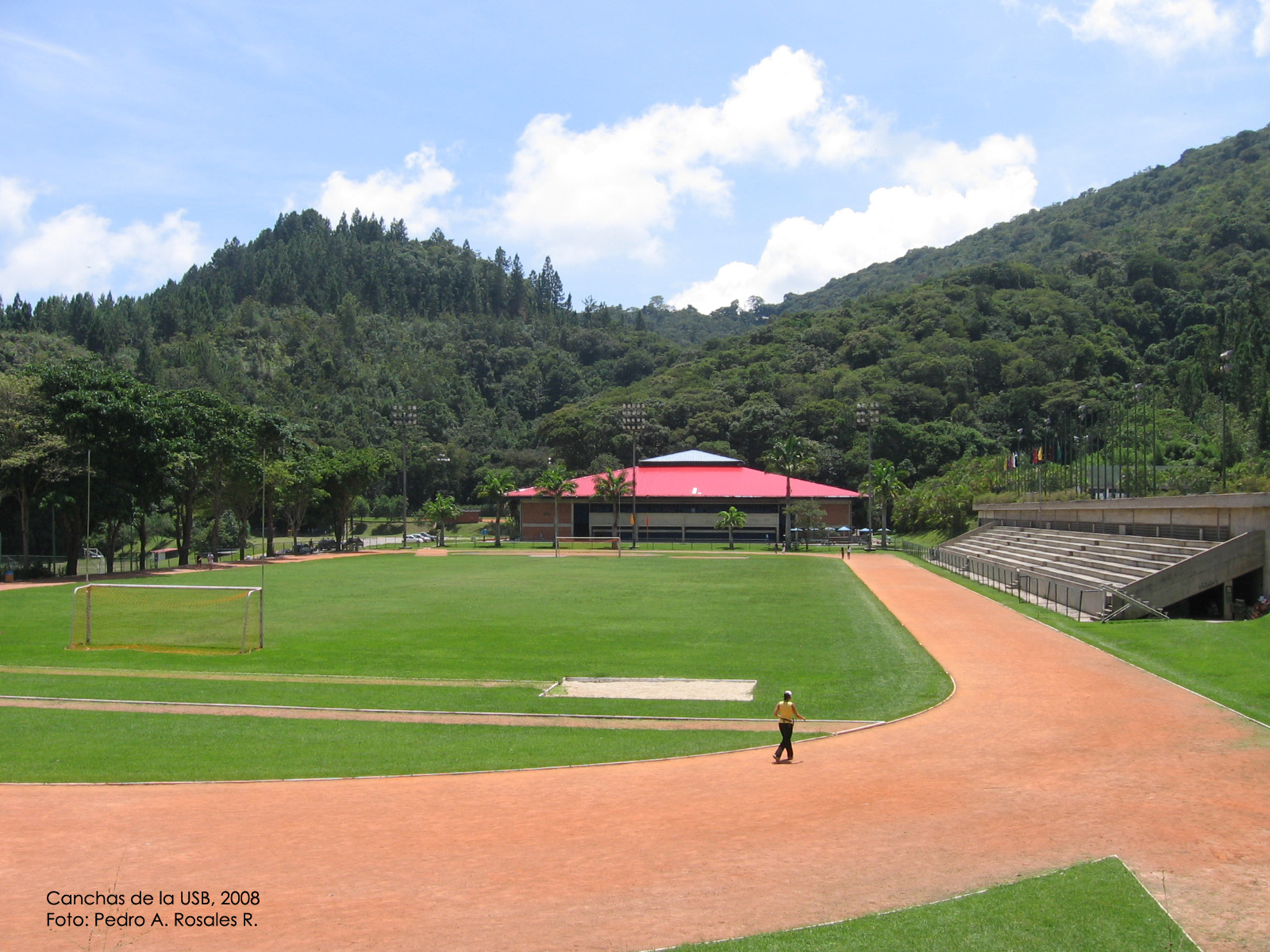 Canchas de la Universidad Simon Bolivar